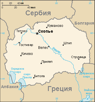 Карта Республики Македонии